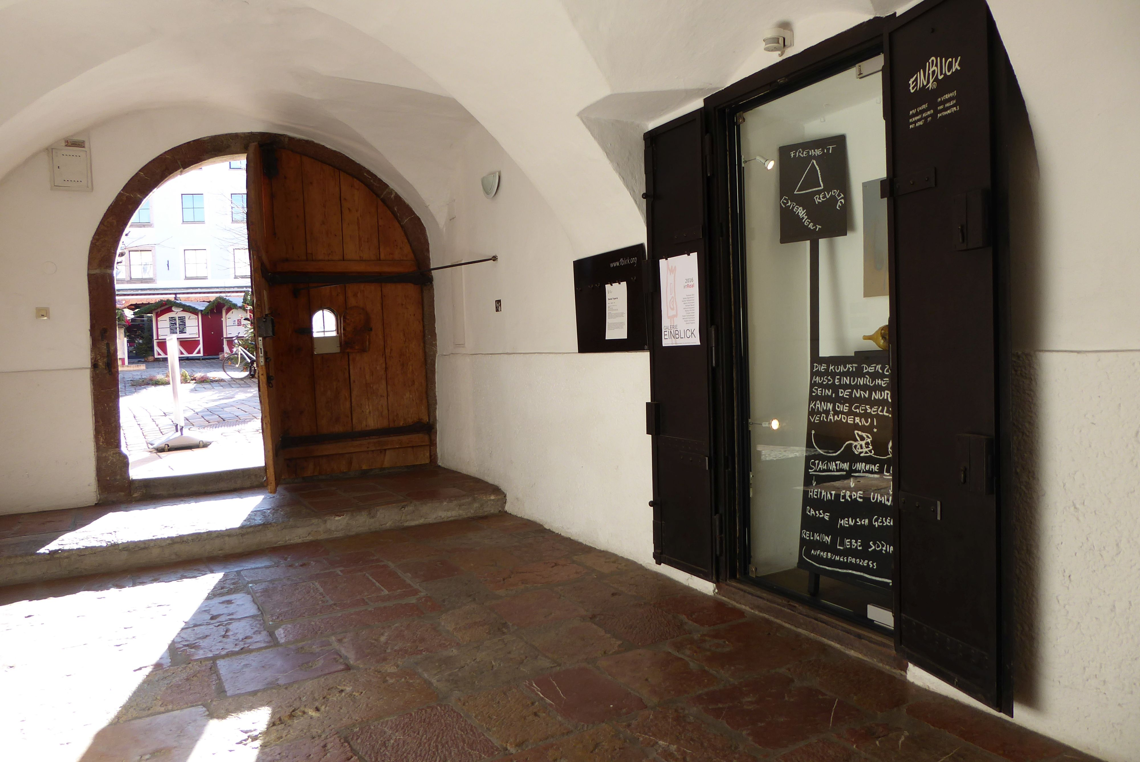 Vorhaus mit Eingangstor und Ausstsellungsraum des Hauses Bayrhamerplatz 8 in Hallein